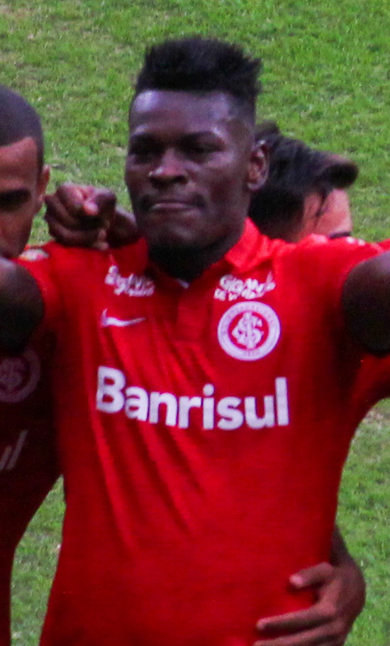 Aylon no Inter em 2016